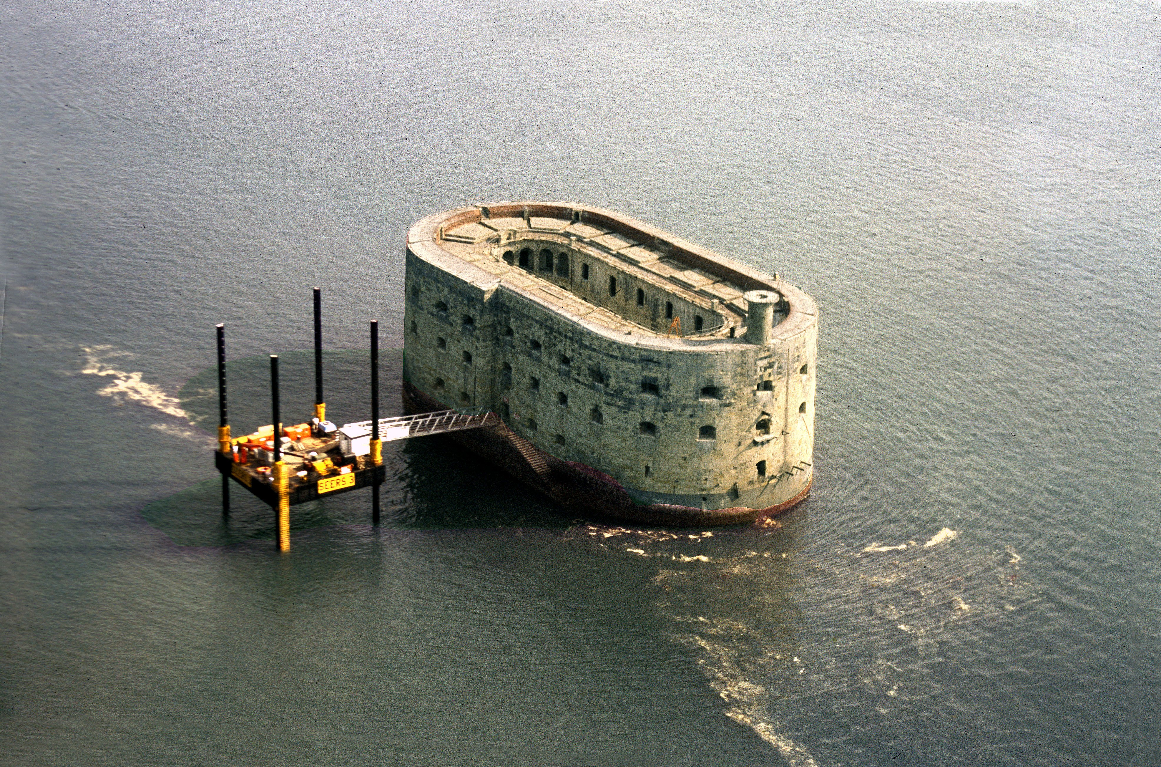 Destiné à assurer la protection de l'embouchure de la Charente et des places fortes associées (Île d'Aix et Rochefort), ce fort du 19ème siècle n'aura pratiquement jamais servi du fait des progrès de l'artillerie. Après avoir été transformé en prison, c'est au 20ème siècle qu'il connaîtra une consécration internationale grâce à un célèbre jeu télévisé ! .